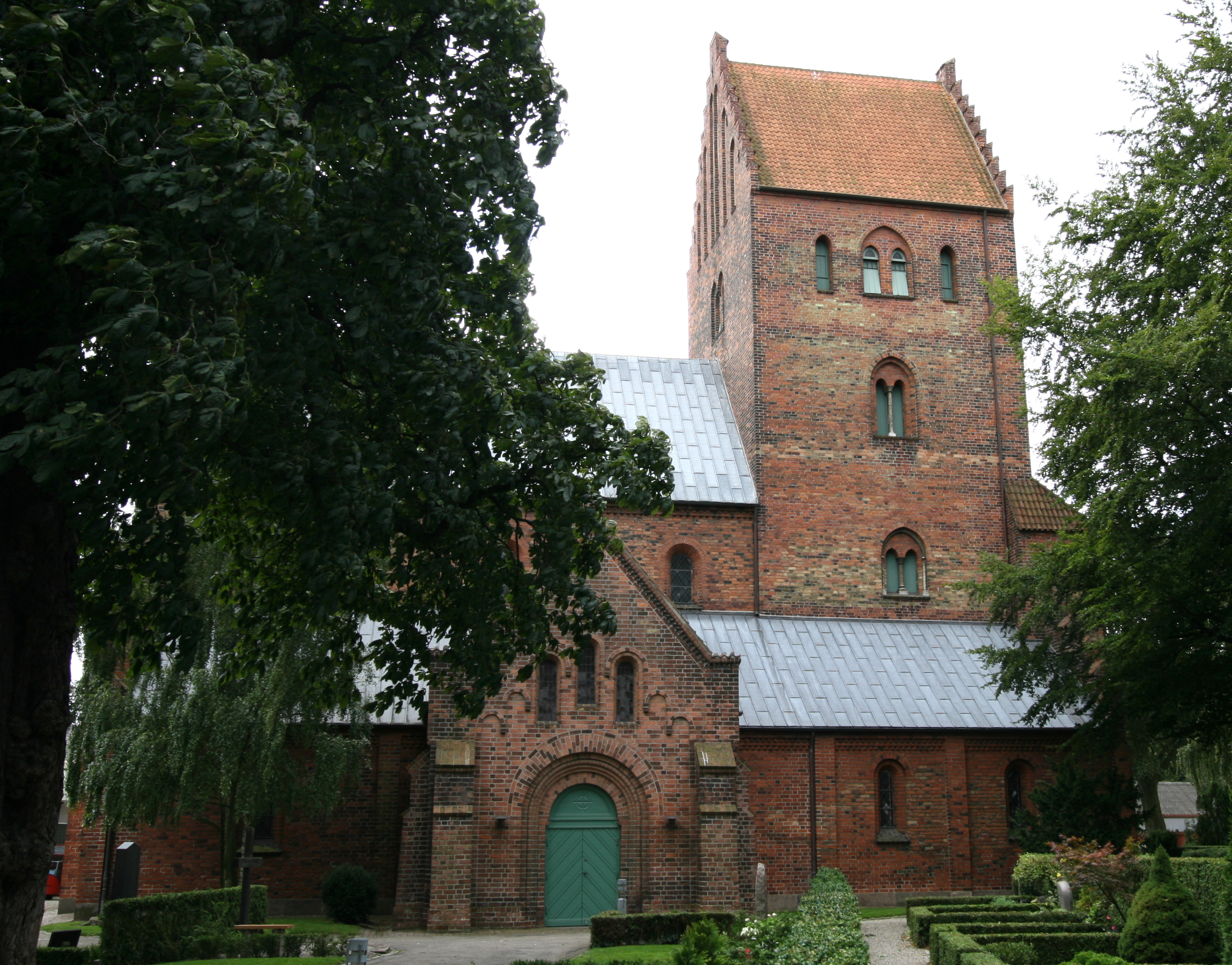 Gammel Vor Frue Kirke in Roskilde, Denmark. Exterior.